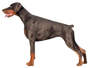 Dobermann sur fond blanc